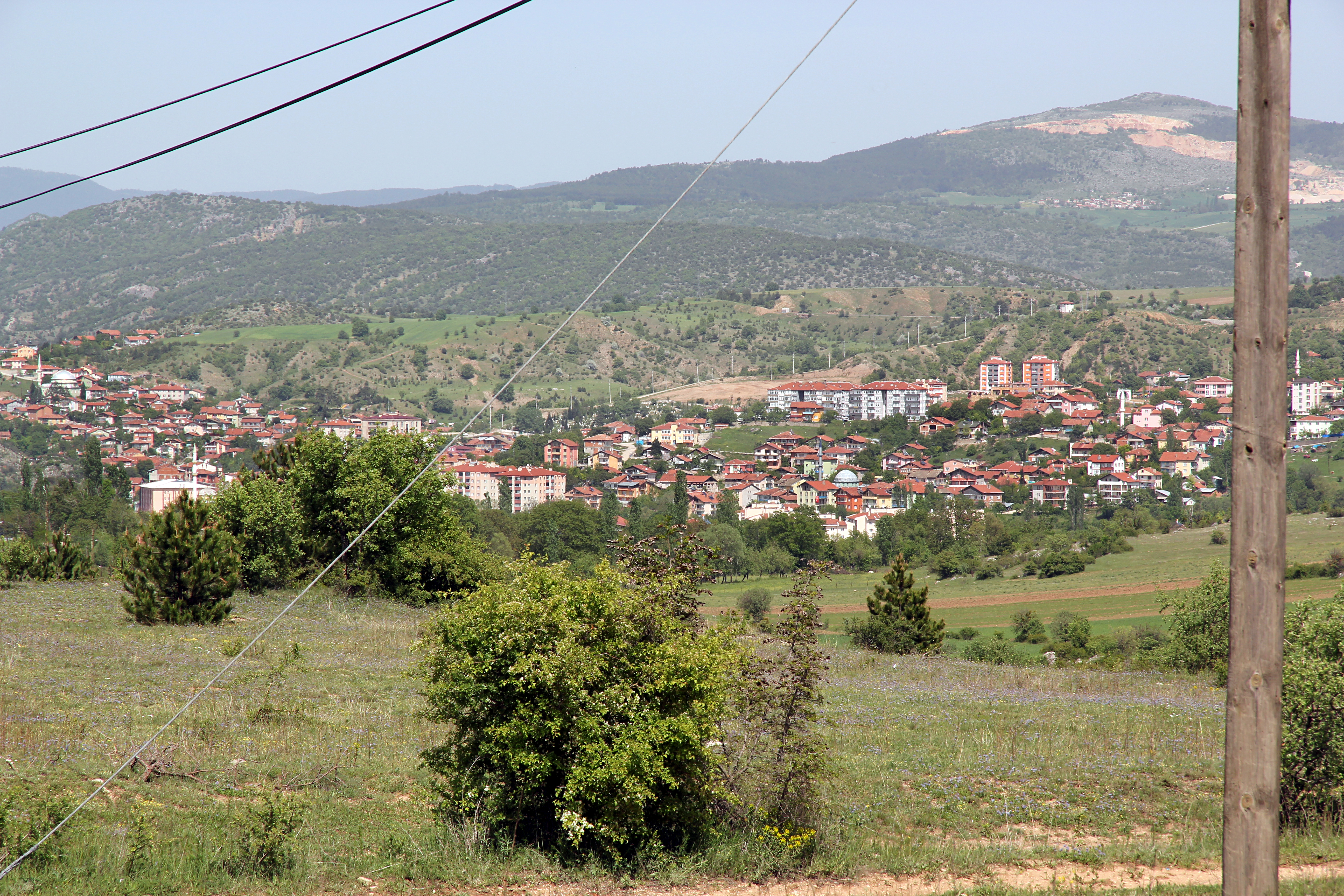 Eskipazar, Kreisstadt in der Provinz Karabük, Nordtürkei